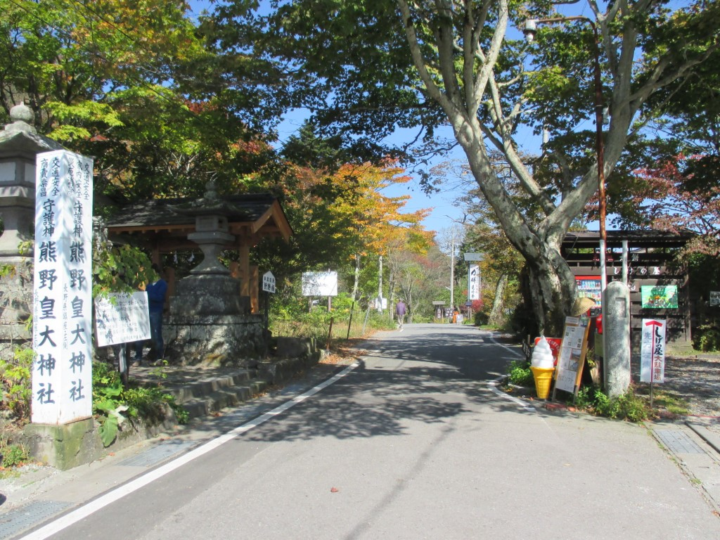 旧碓氷峠（群馬県安中市松井田町・長野県北佐久郡軽井沢町）